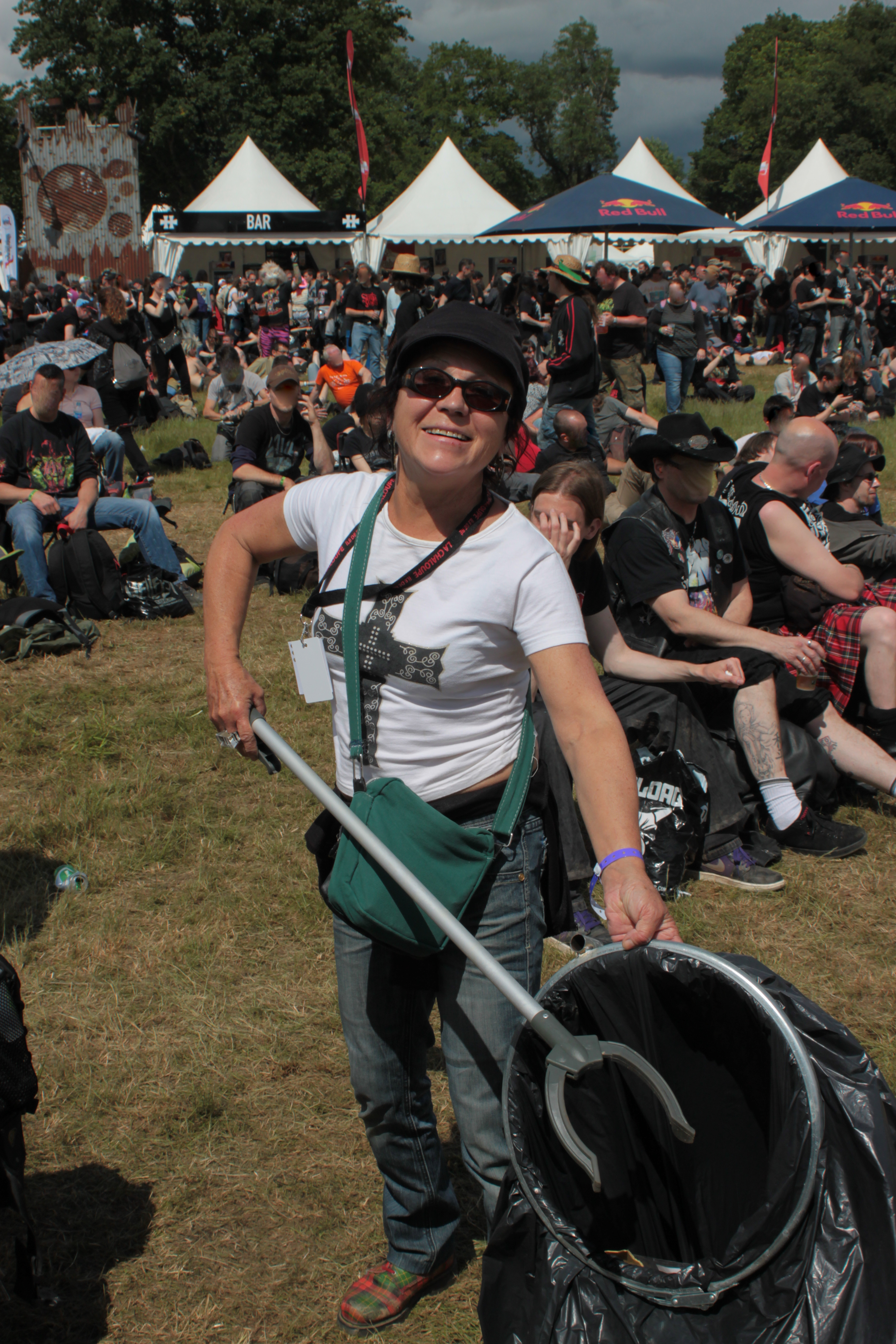 Bénévole du Hellfest 2013, Fr-44, Clisson.